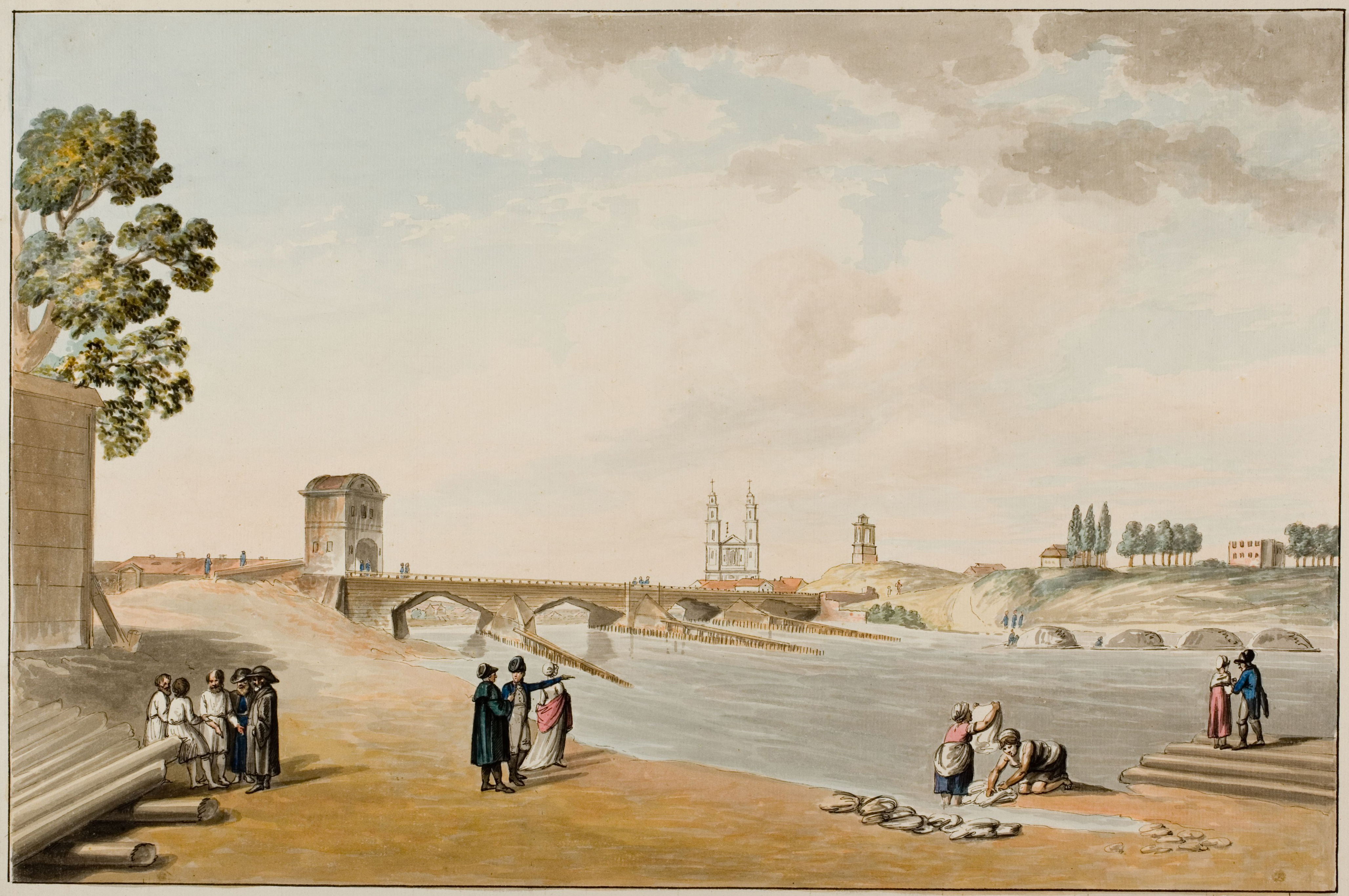 Беларуская (тарашкевіца): Вільня (Vilnia), Зялёны мост (Zialony most)